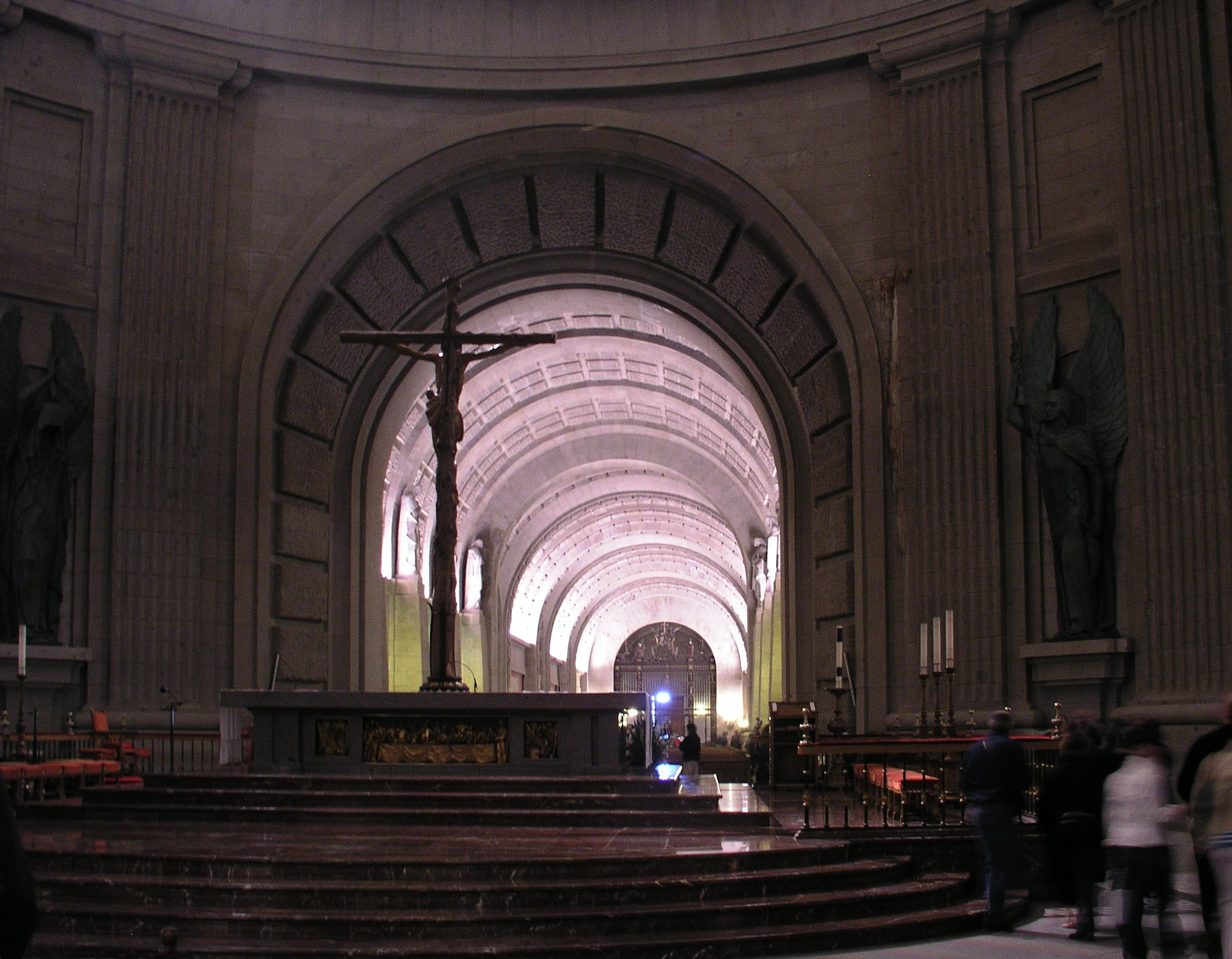 Valle de Los Caidos, Madrid, Spain. High altar.